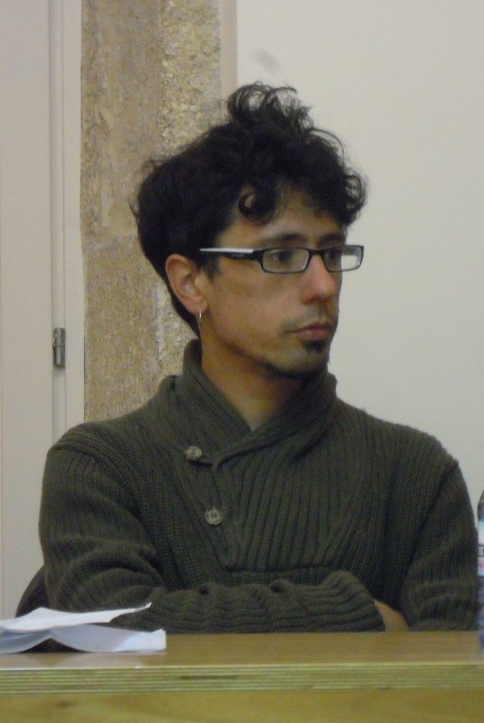 Samuel Solleiro presentando a súa obra Gran tiburón branco na Librería Couceiro de Santiago de Compostela